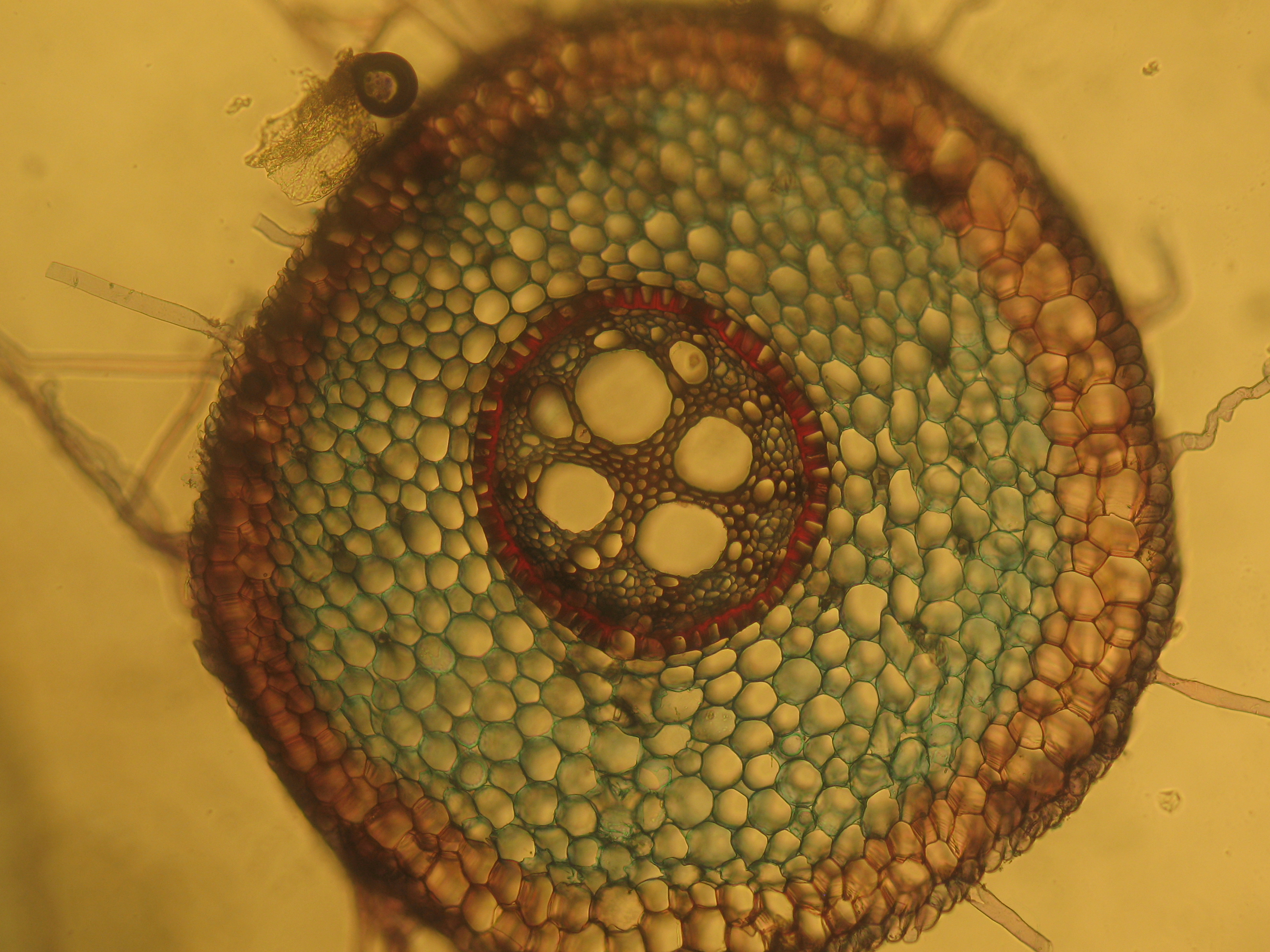 Iris germanicae, Wurzelquerschnitt gefärbt mit Astrablau und Safranin Im Bild von außen: Wurzelrinde (blau), Endodermis mit Durchlasszellen (roter ring), und radiäres Leitbündel mit Innenxylem (rot, große "Löcher") sowie dem Phloem (blau)